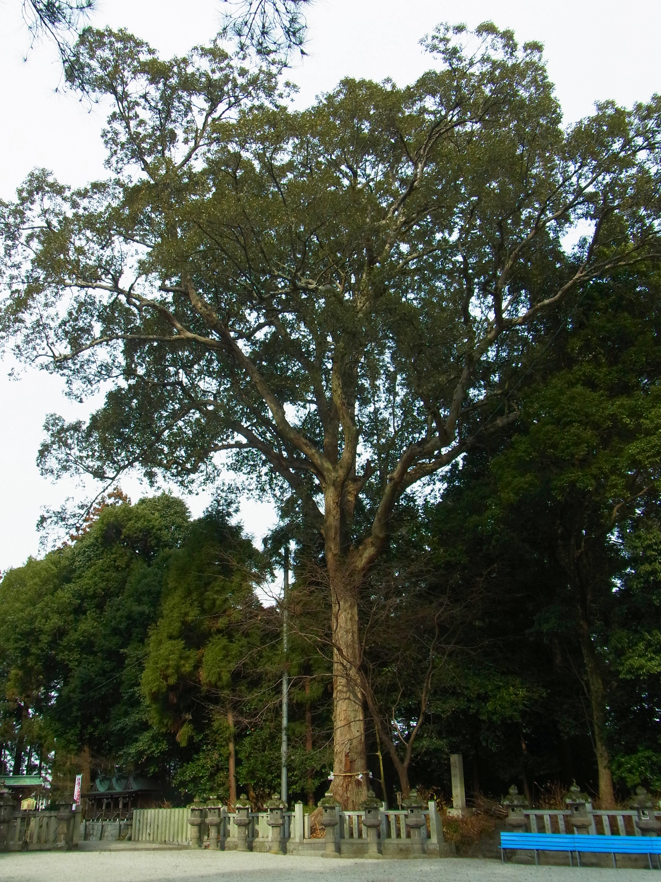 鴨都波神社ご神木のイチイガシ 御所市宮前町 Quercus gilva 2012.1.18